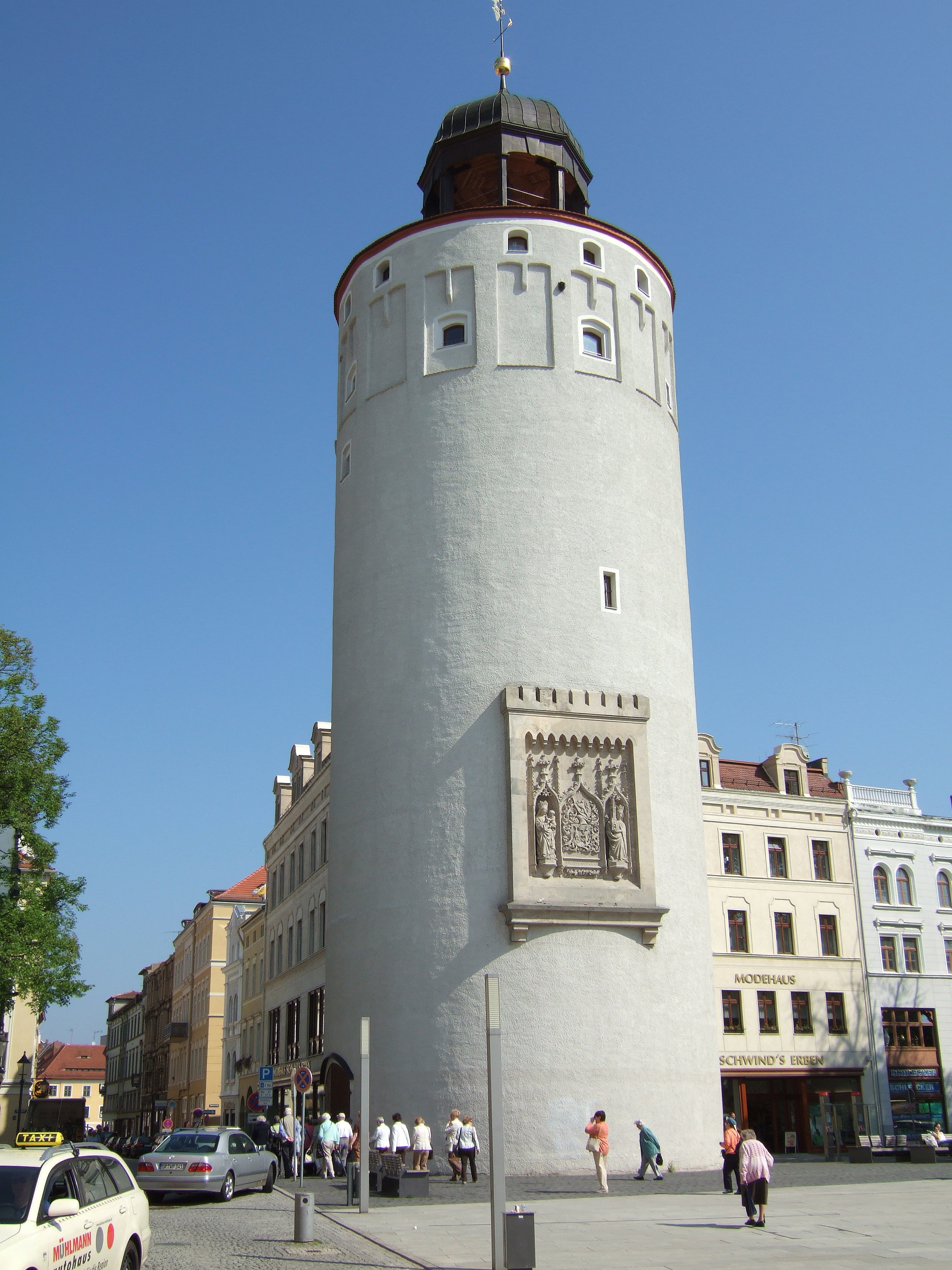 Dicker Turm in Görlitz Sonstiges: public domain